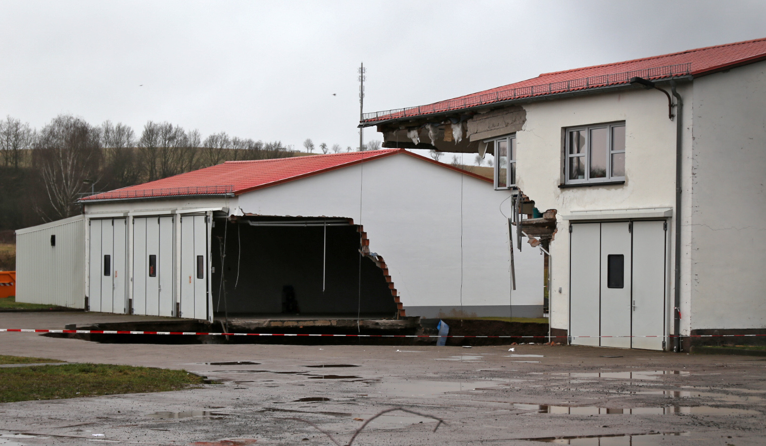 Erdfall auf dem Gelände des Brand- und Katastrophenschutzzentrums in Nordhausen (Thüringen)